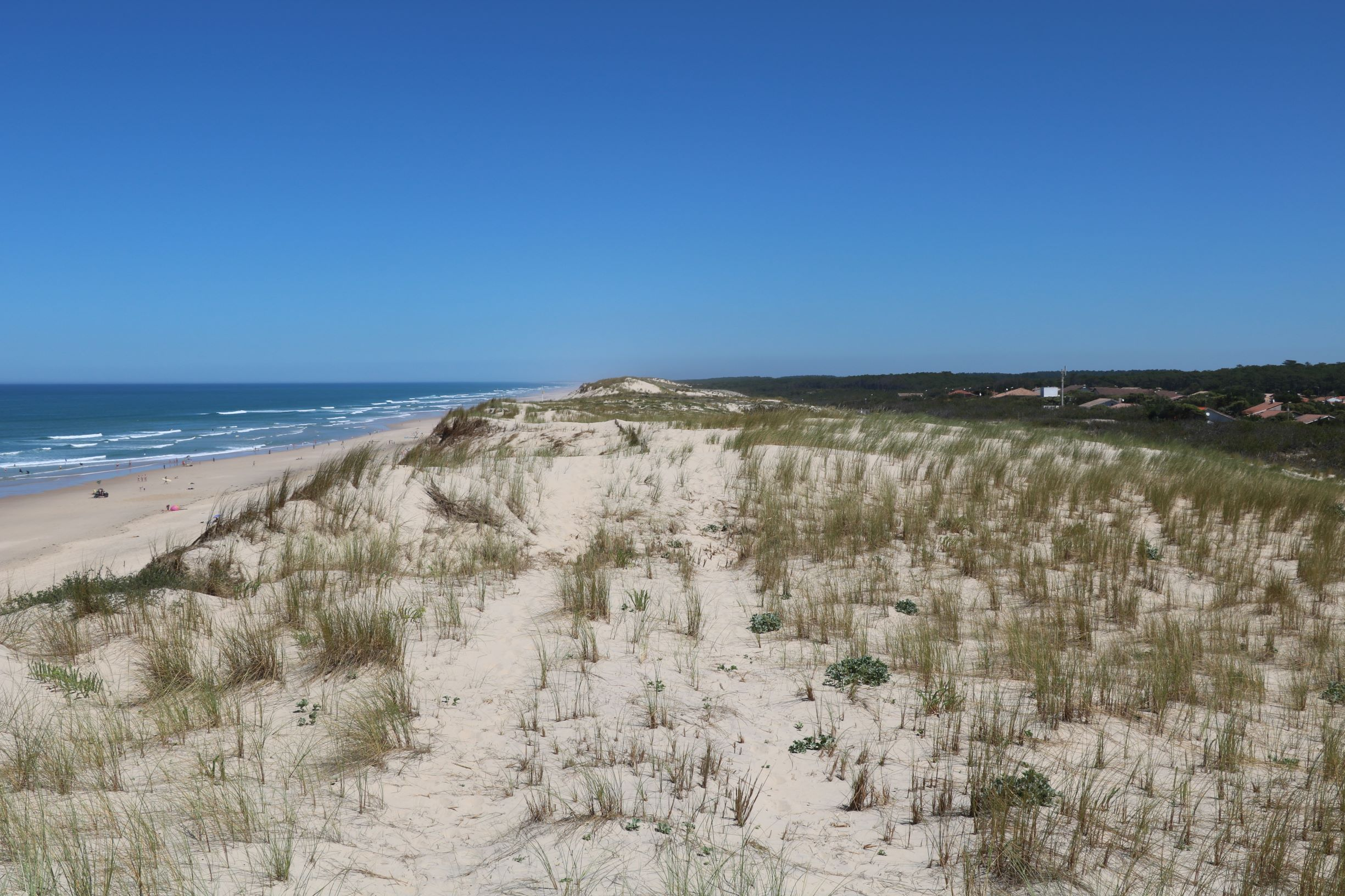 Hourtin-Plage séparée de la plage centrale par le cordon dunaire, sur la Côte d'Argent